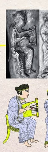 նկ․ 1